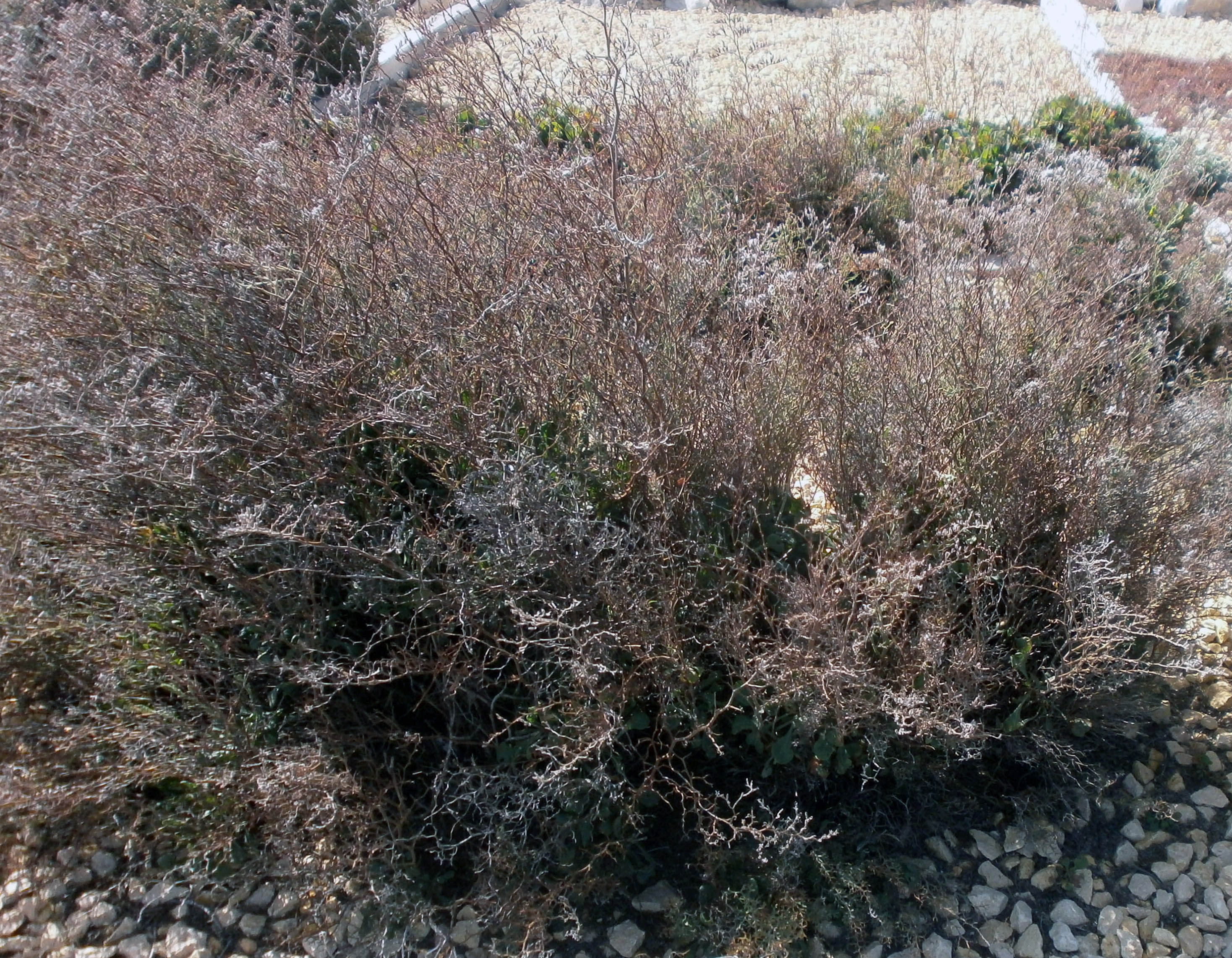 Siempreviva alicantina o saladilla (Limonium furfuraceum).